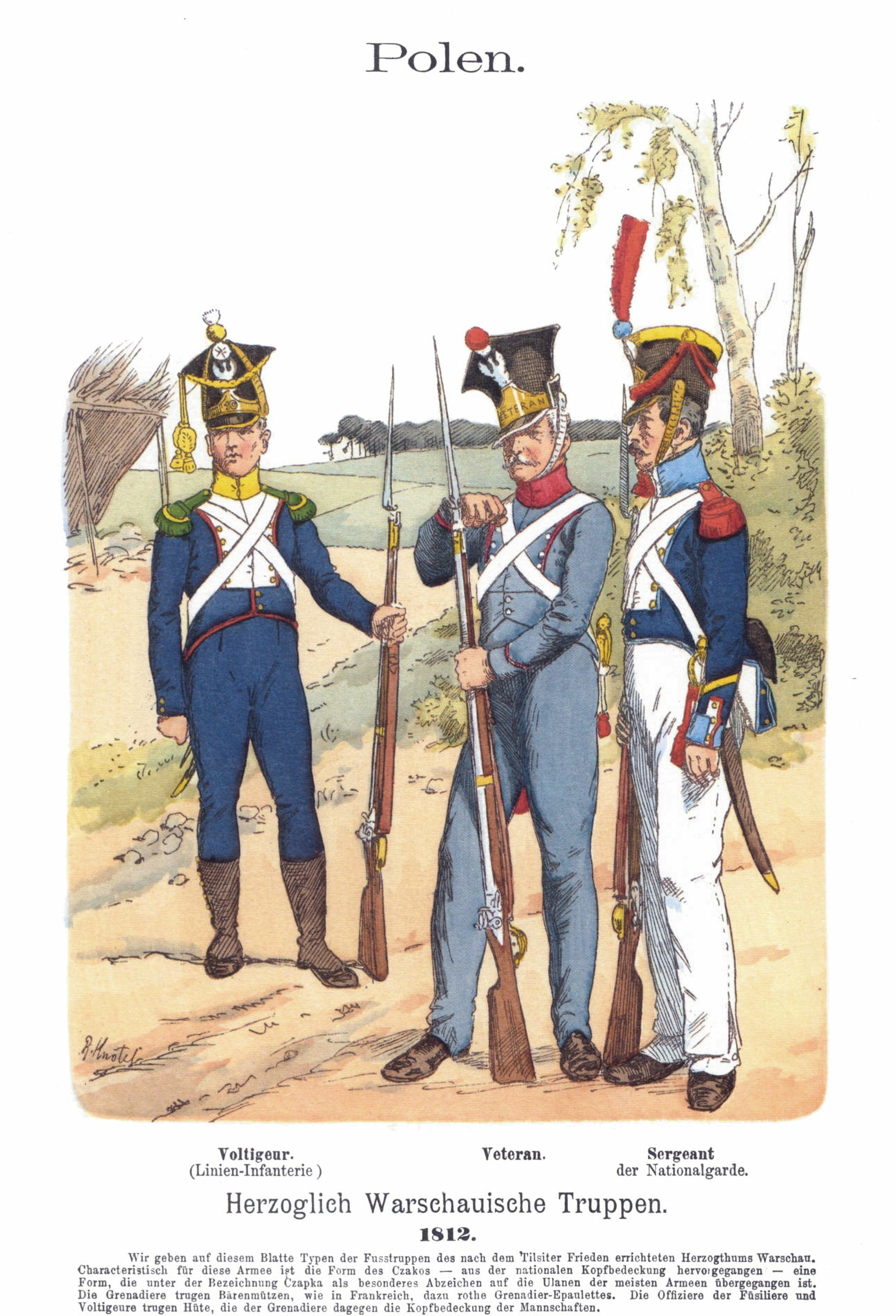 Knötel, Band IV, Tafel 9:Polen. Voltigierer (Linien-Infanterie), Veteran und Sergenat der Nationalgarde, Herzoglich Warschauische Truppen um 1812